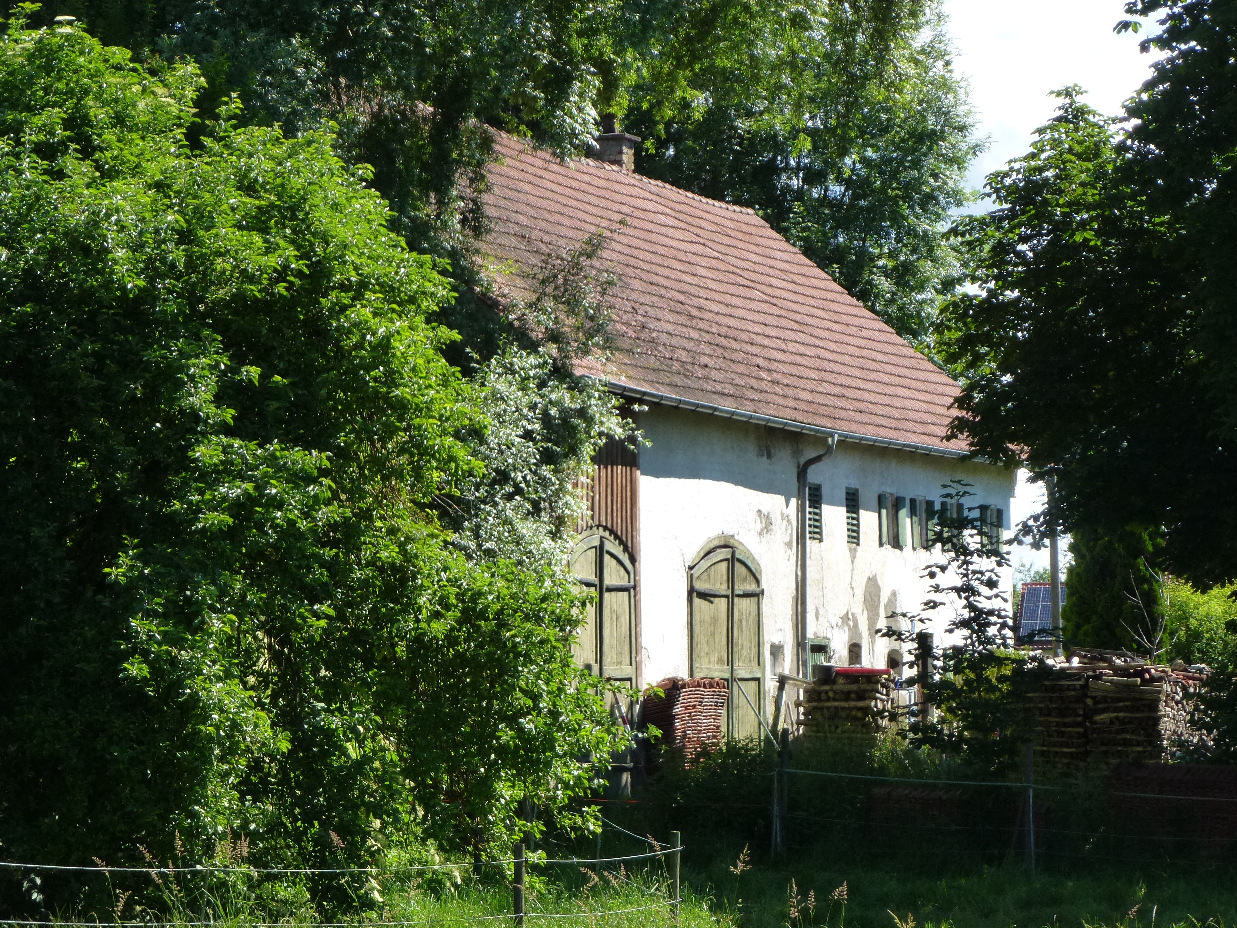 Kottgeisering, Dorfstr. 16, Bauernhof. Ansicht von WSW